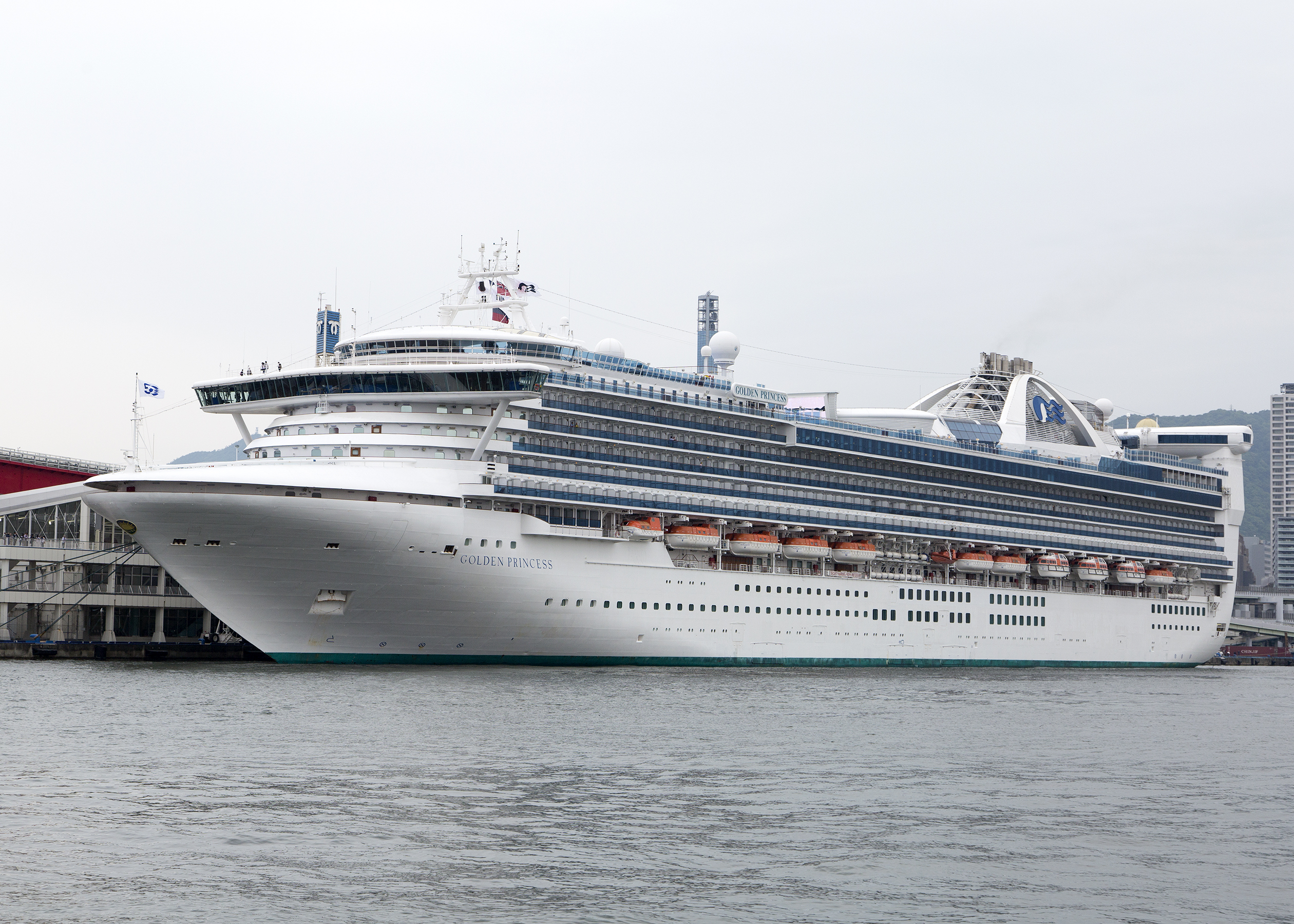 ゴールデン・プリンセス 神戸港にて